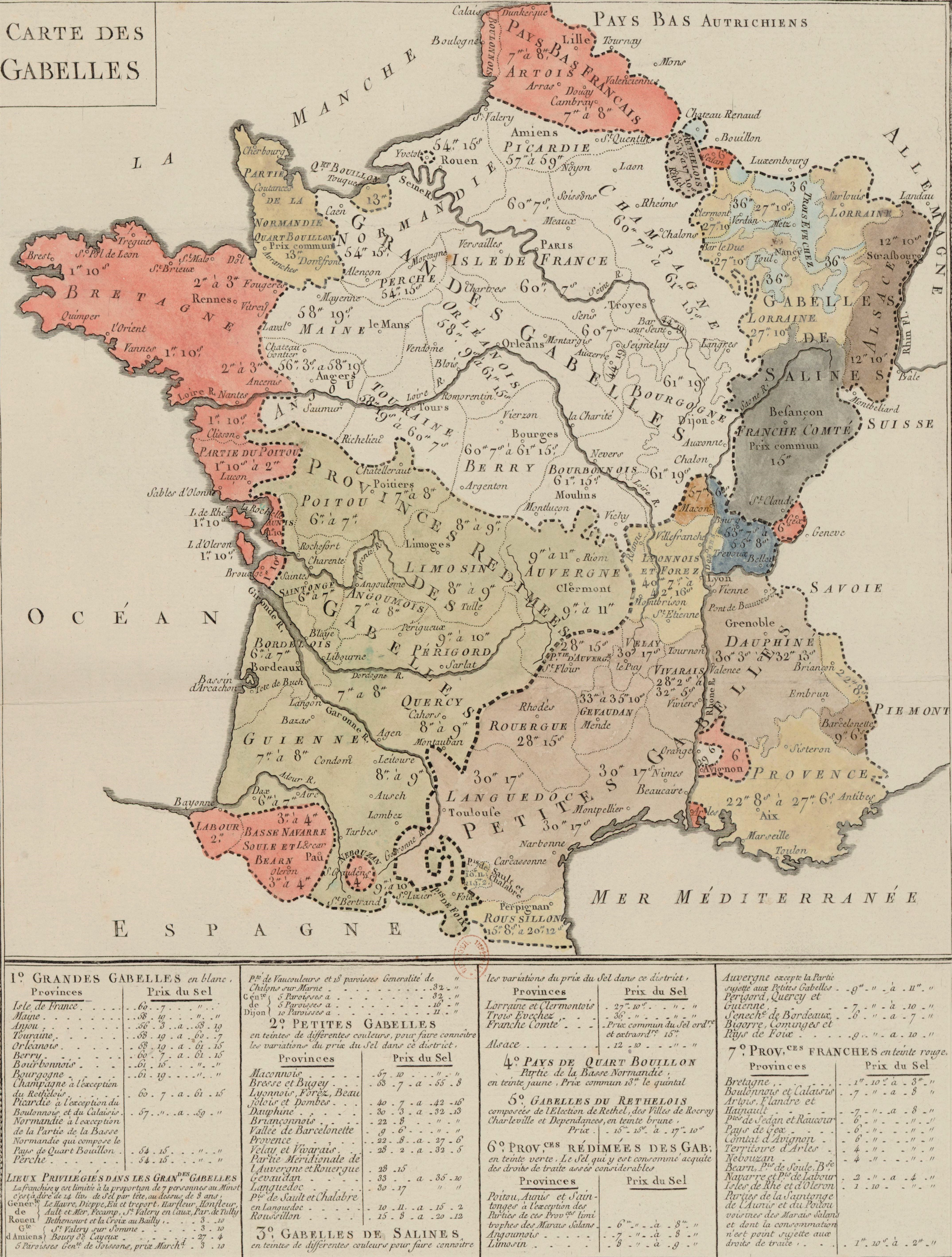 Carte des gabelles en.France en 1788. 1 est. : eau-forte, col. ; 39 x 30 cm (élt d'impr.)